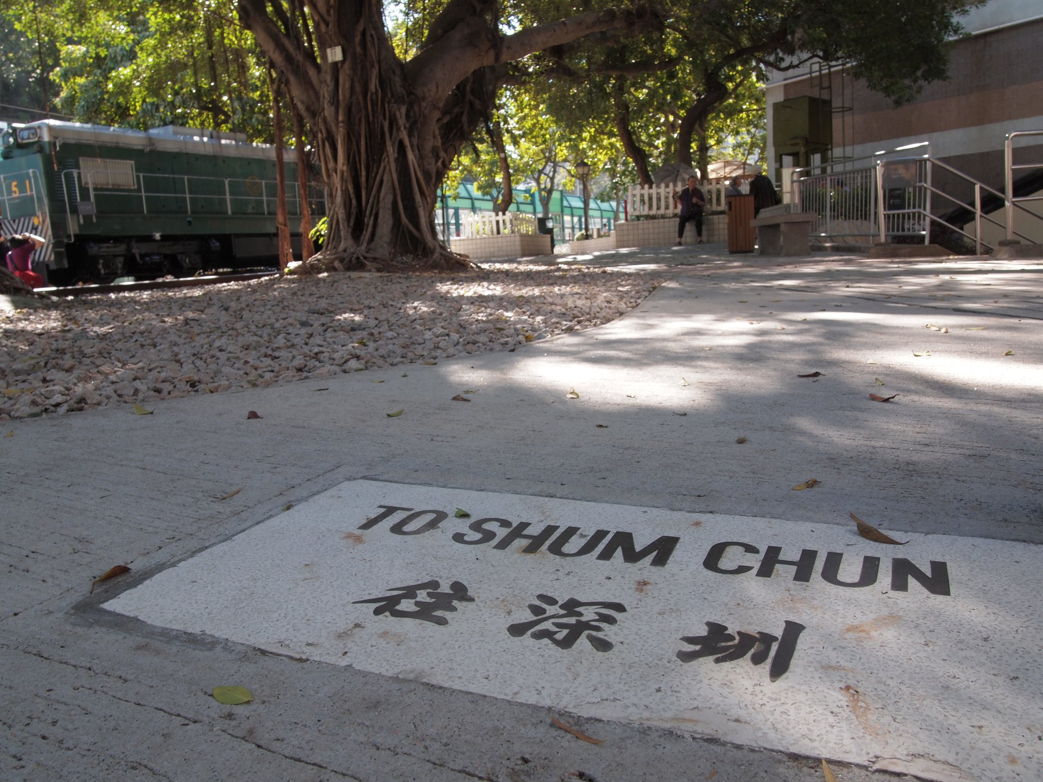 香港鐵路博物館，有往圳之牌，鑲在地上。深圳市的粵音英文名為「Shum Chun」。